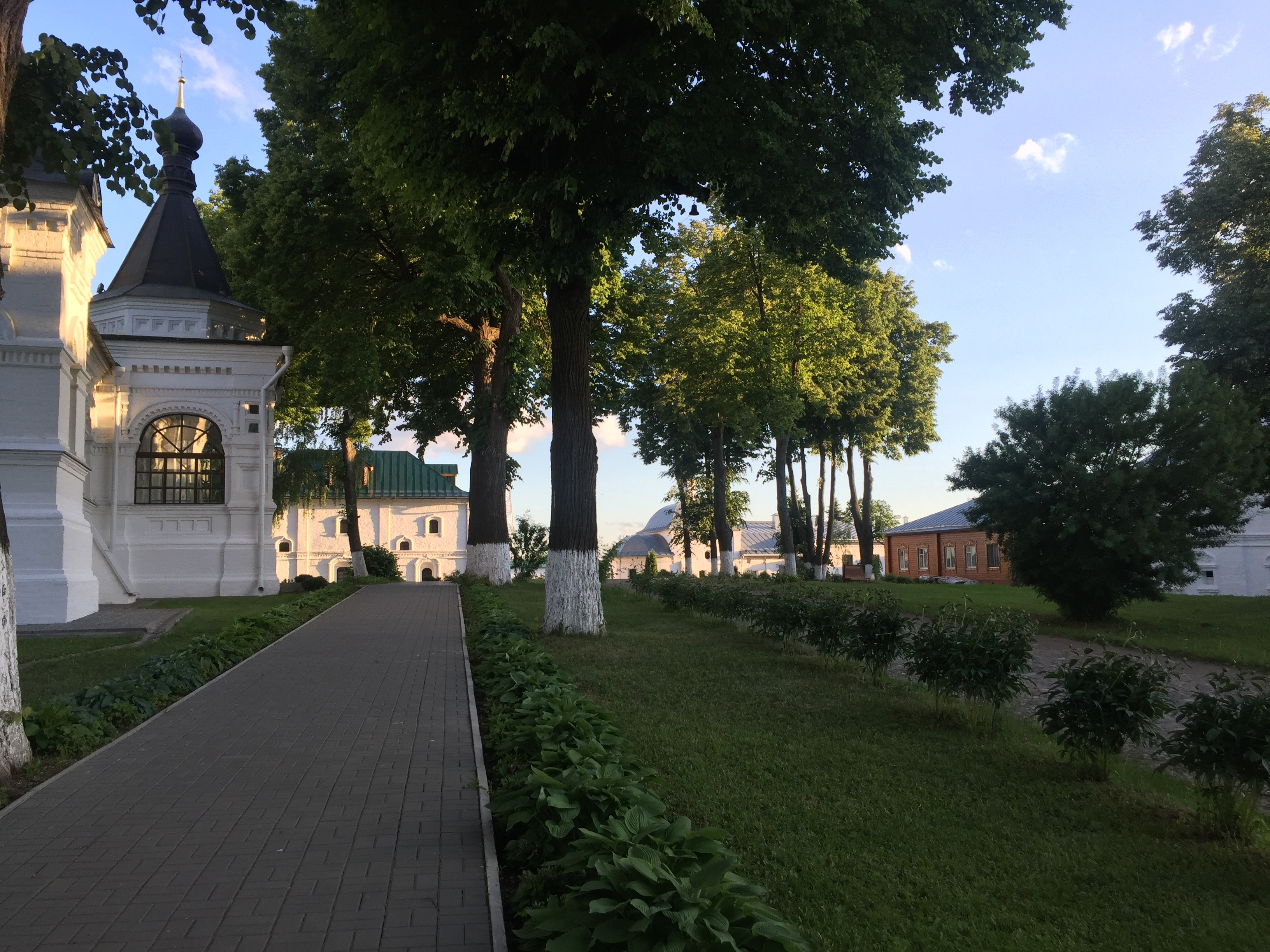 На территории монастыря